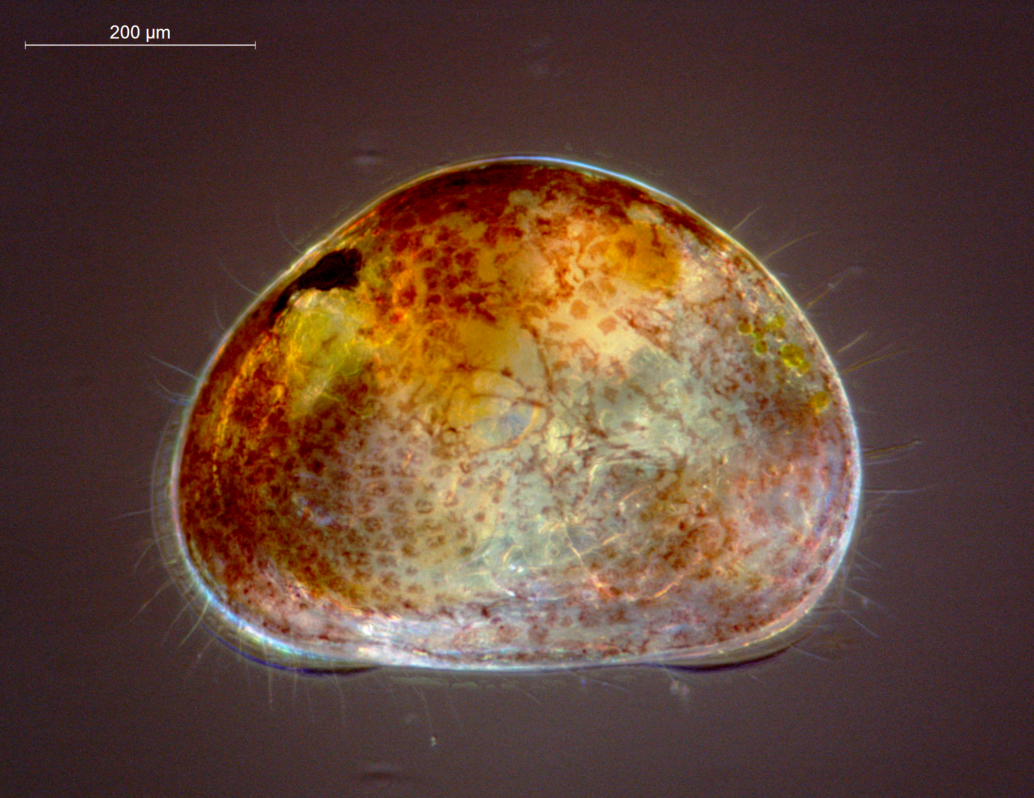 Krepsdyret cypriakreps (Cypria opthalmica)